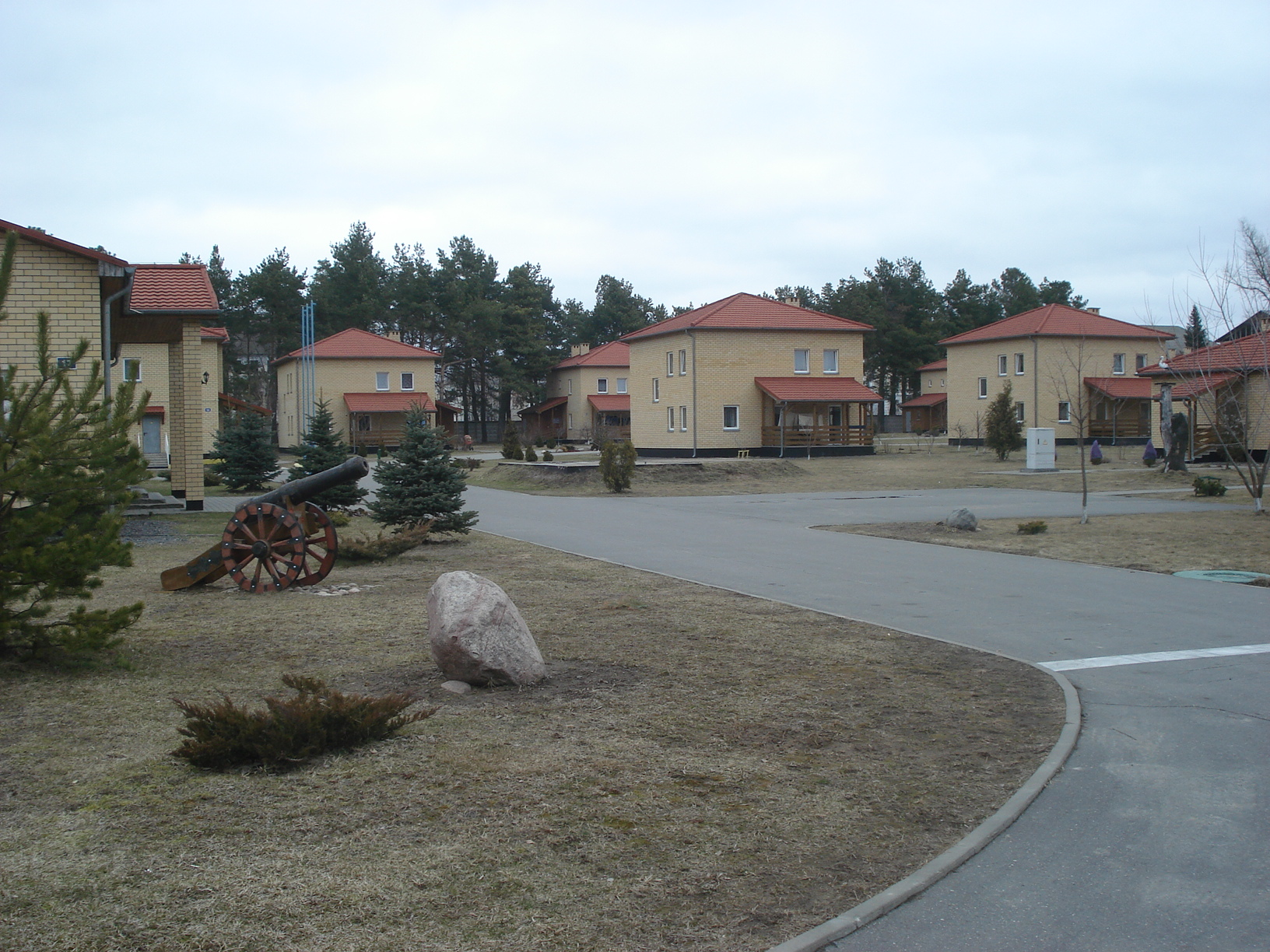 Беларуская (тарашкевіца): Мар’іна Горка